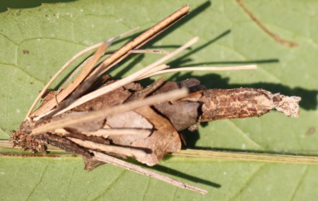 Sack des Großen Sackträgers (Canephora hirsuta) am 29. Mai 2018, der Schmetterling ist noch nicht geschlüpft